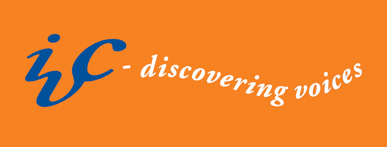 Logo des Internationalen Gesangswettbewerbs von ’s-Hertogenbosch (international Voice Contest / IVC)